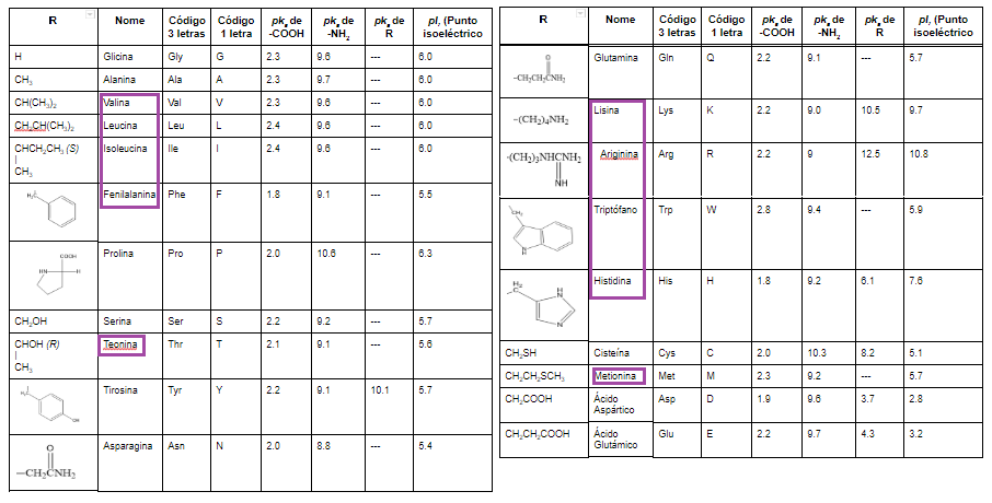 Os aminoácidos recadrados en violeta son esenciais e o ser humano non é quen de sintetizalos por si mesmo.